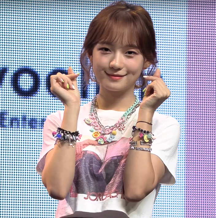 2019_Rocket_Punch_1st_Mini_Album_Pink_Punch_Showcase_So_Hee